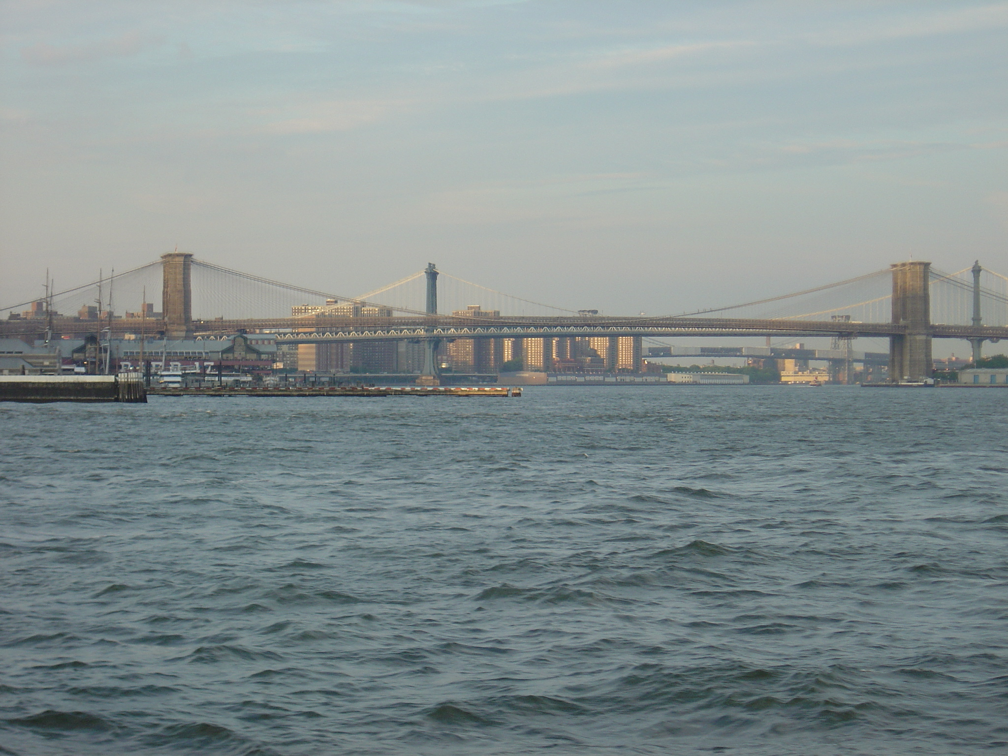 unavailable